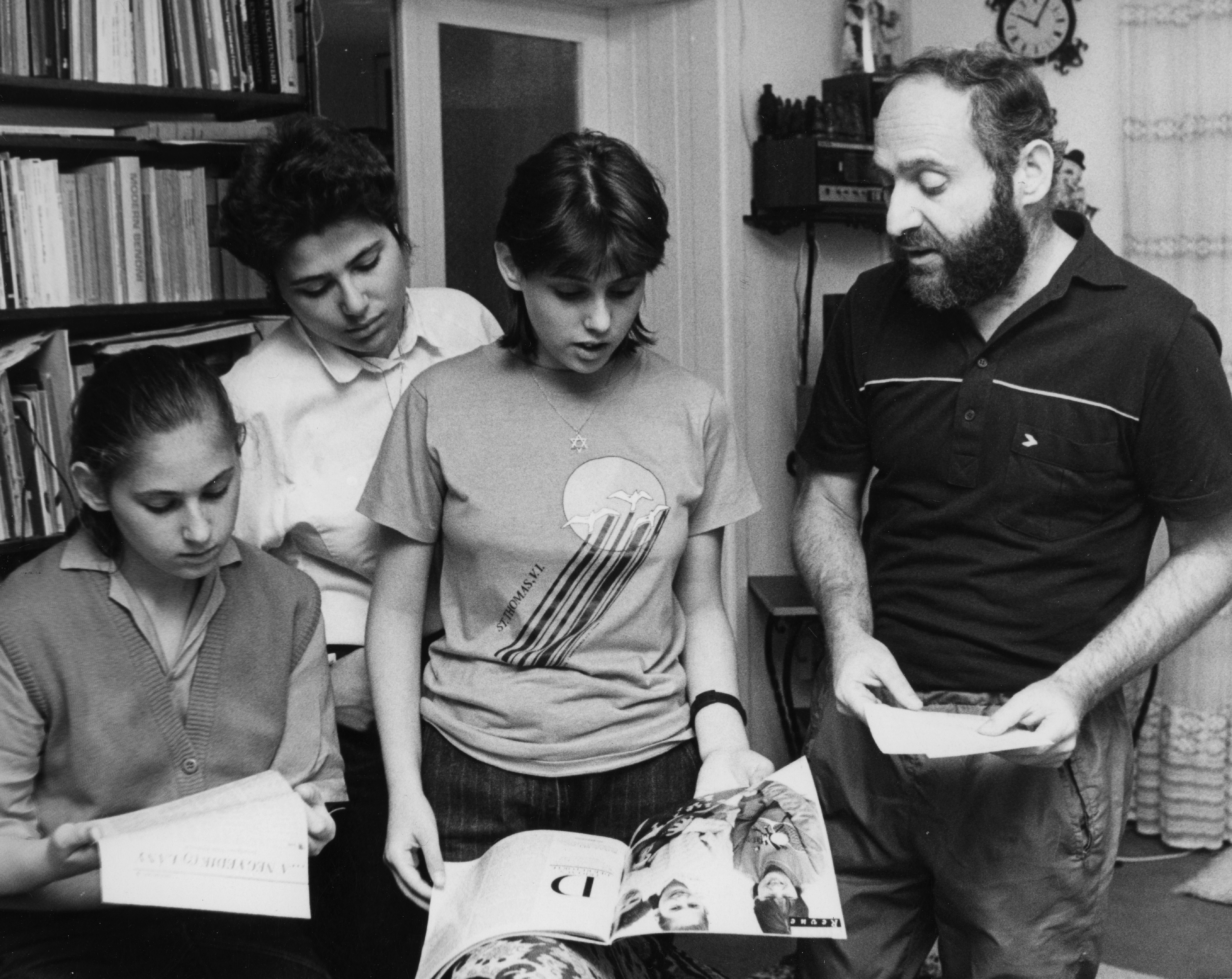 A Polgár lányok: Judit, Zsuzsa, Zsófia és édesapjuk, Polgár László.